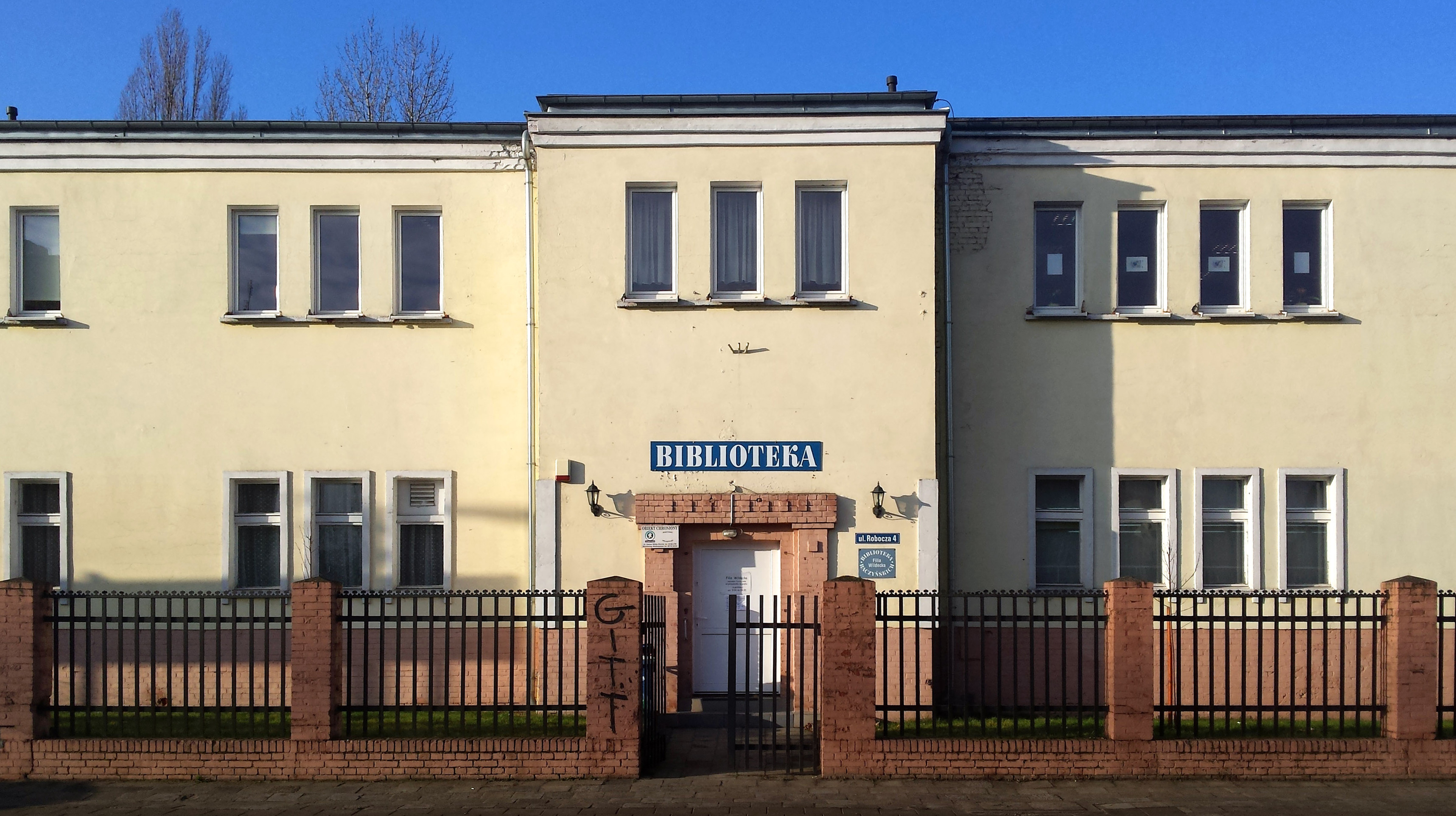 Biblioteka Raczyńskich, Filia Wildecka przy ul. Roboczej, widok z przystanku autobusowego Bergera.